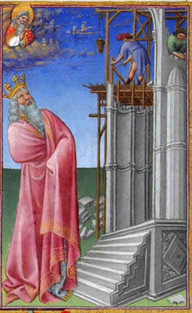 Les Très Riches Heures du duc de Berry, Folio 35v - The Building of the Jerusalem Temple the Musée Condé, Chantilly.